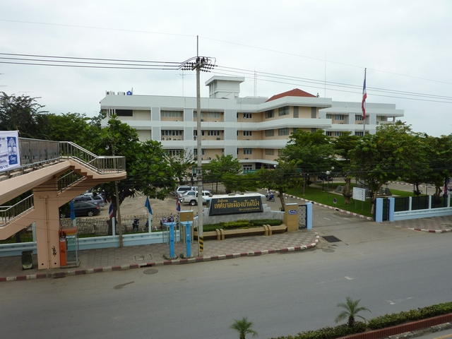 สำนักงานเทศบาลเมืองบ้านโป่ง